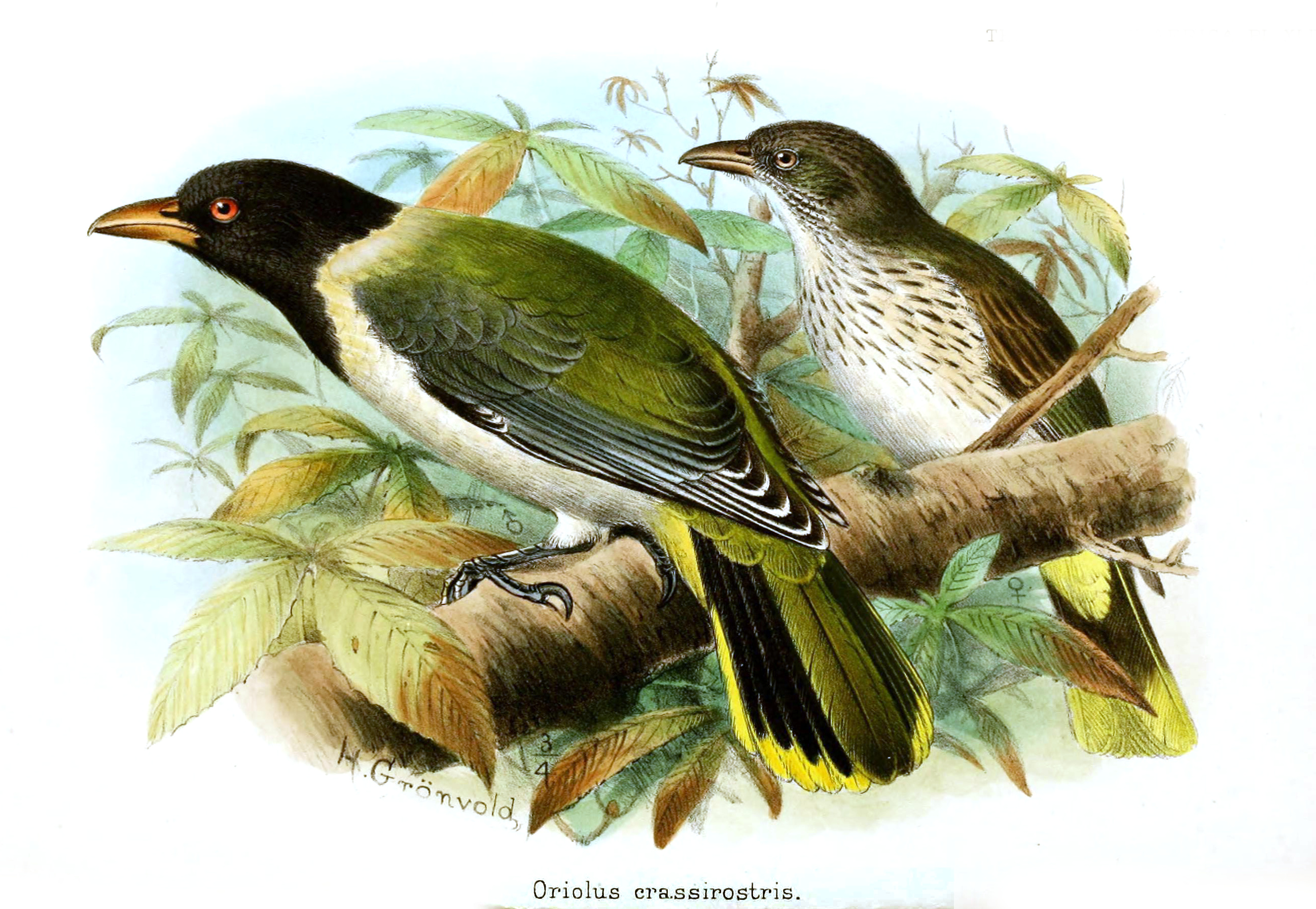 Oriolus crassirostris